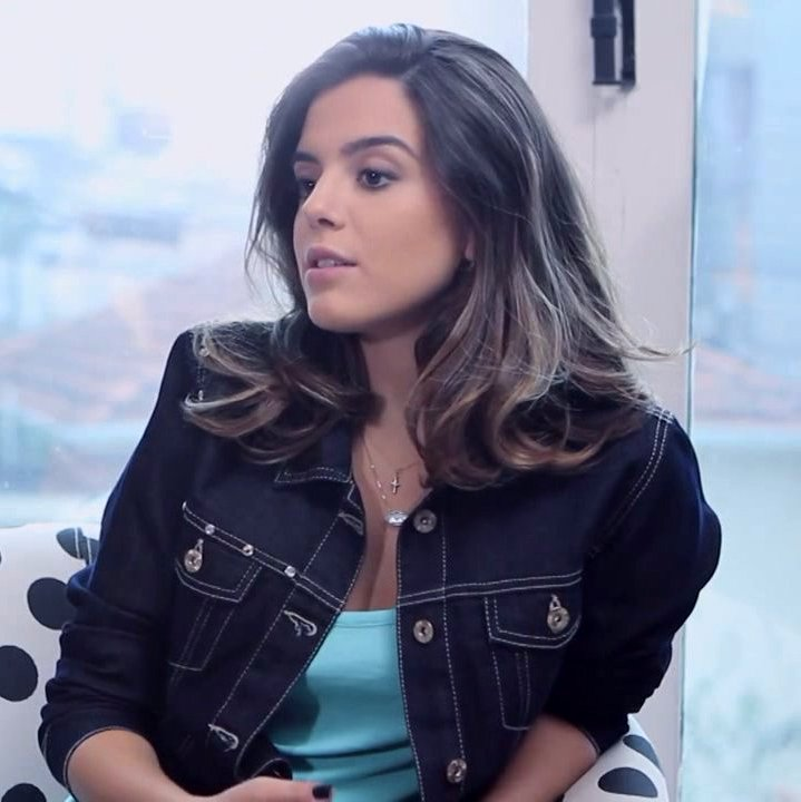 Atriz Giovanna Lancellotti aceita o convite para passar o dia com os sintomas de um paciente com Doença de Crohn.